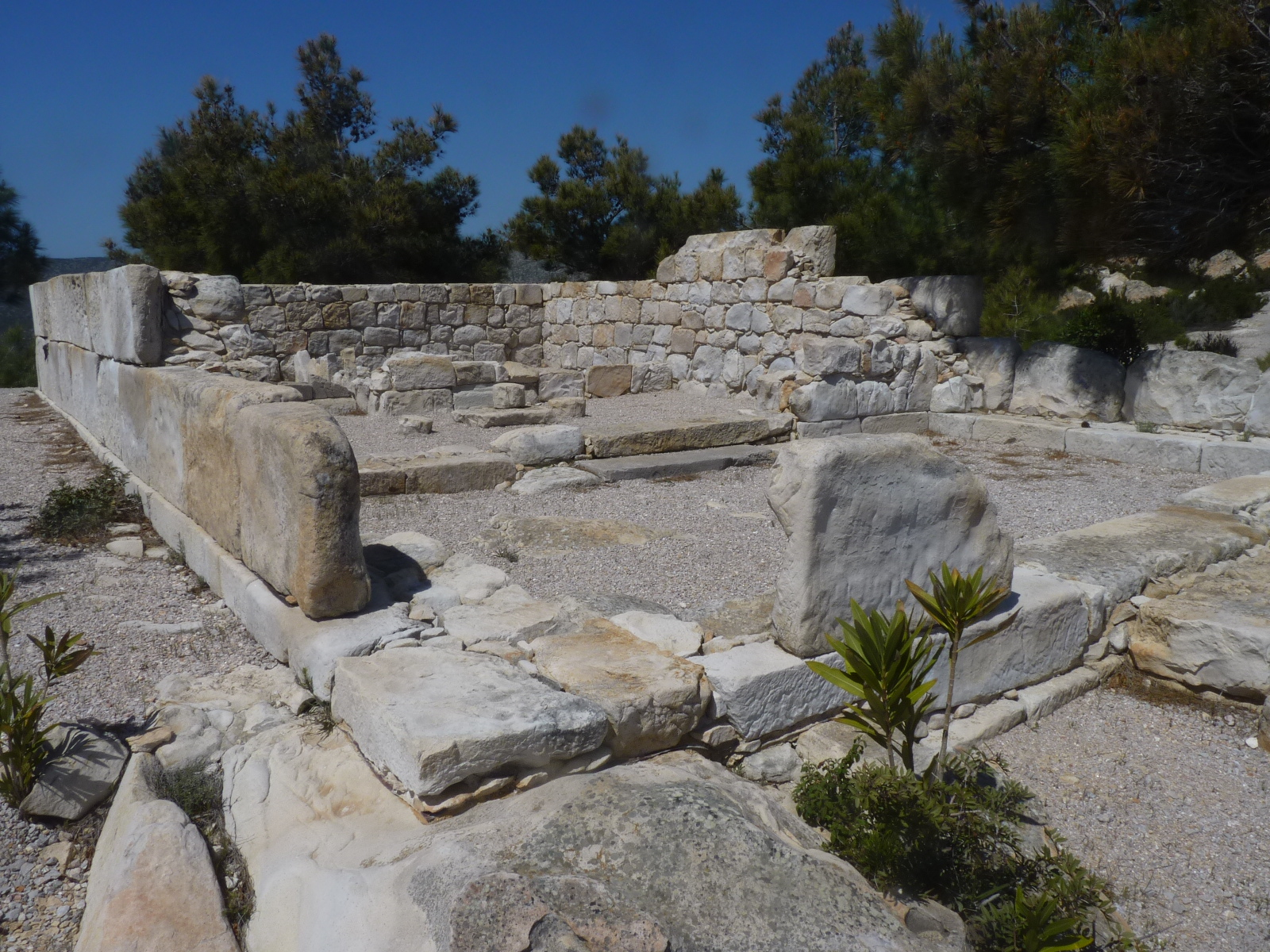 Αρχαιολογικός χώρος Εμποριού, Χίος